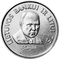 1 litas coin